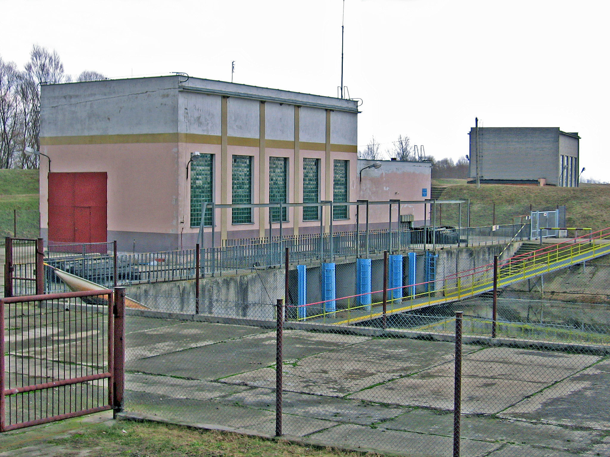 Pompownia w Dobrzykowie Author: Siedlaro ¿? Date: April 2006